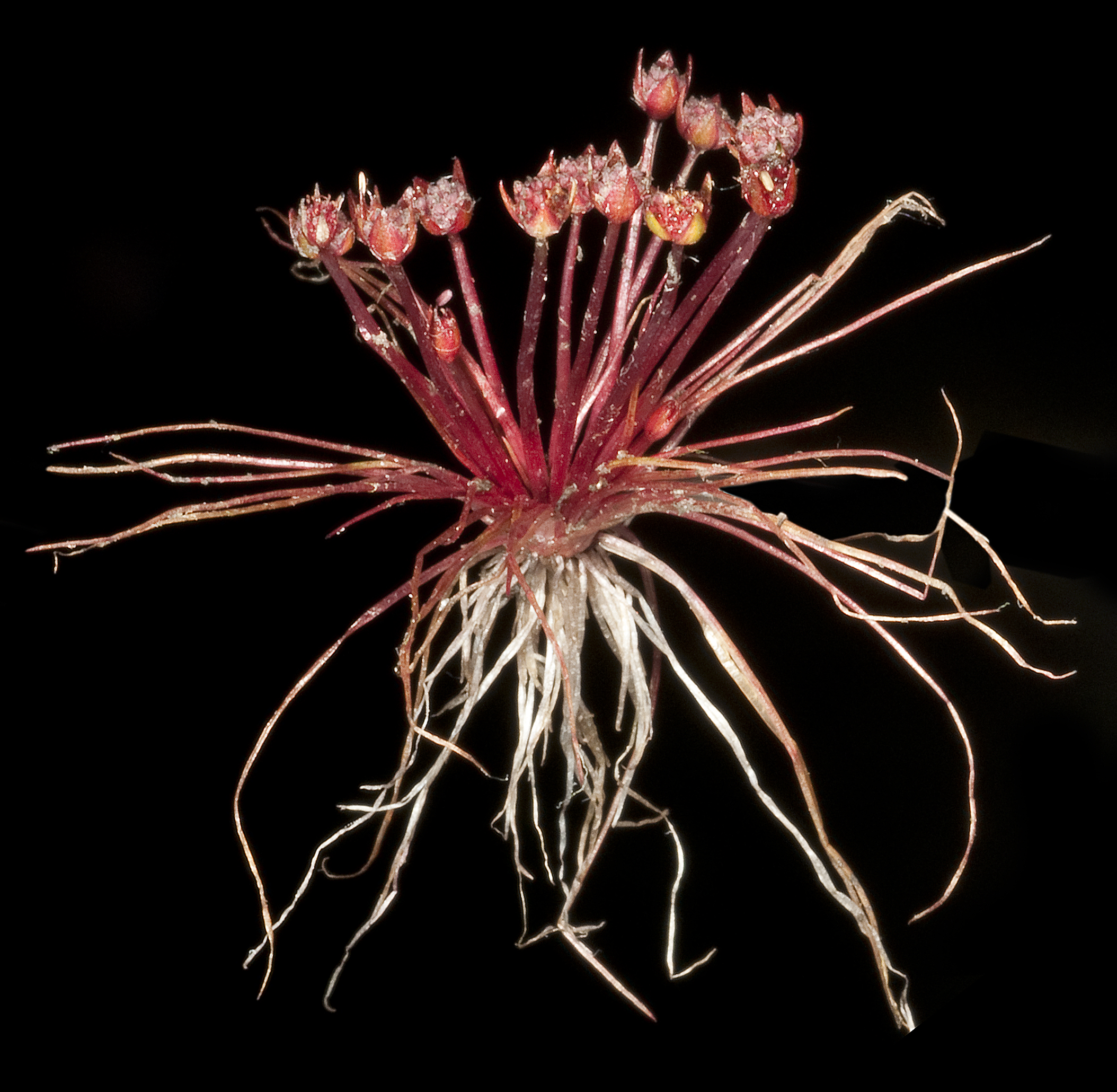 KRT4410